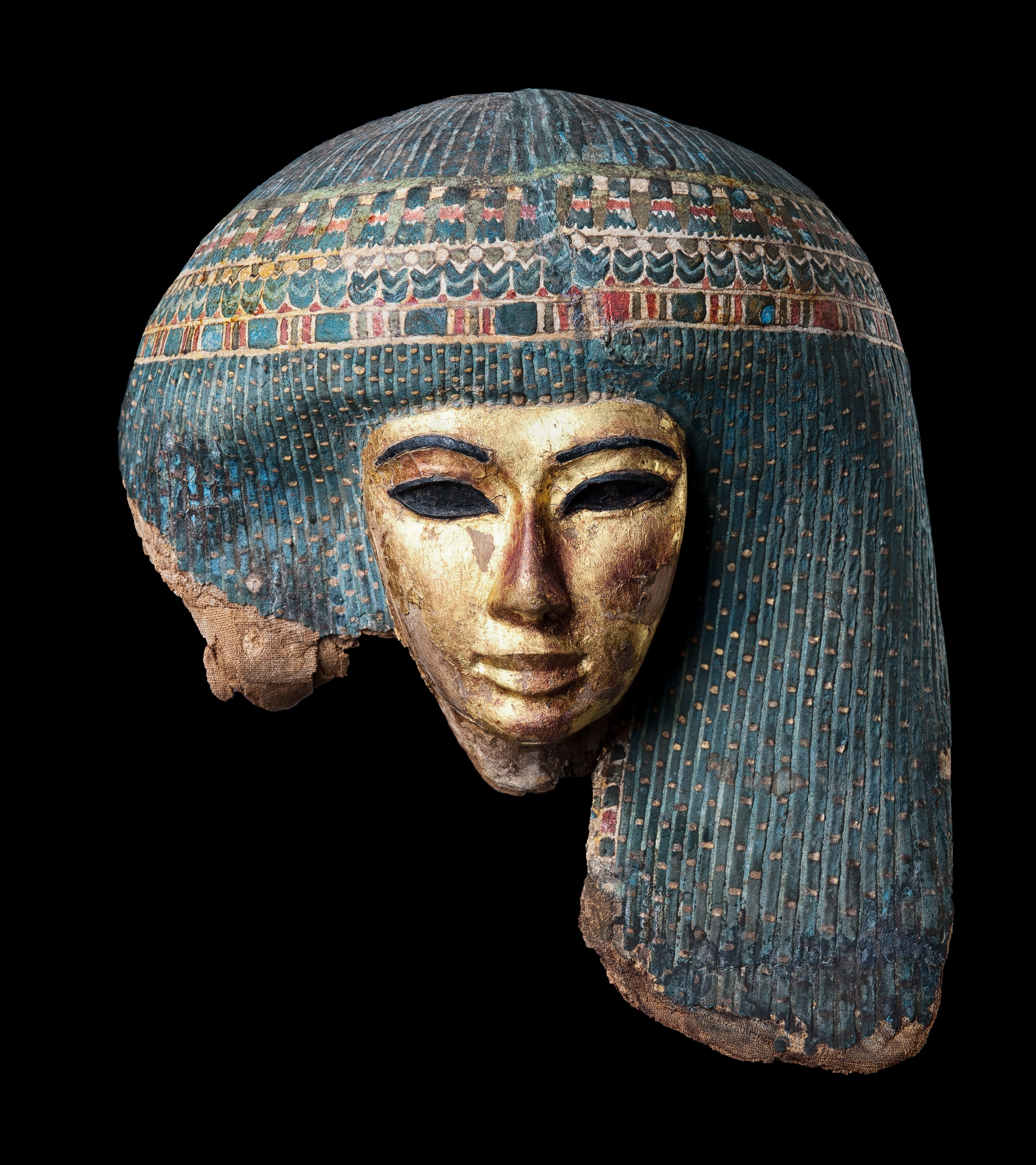 llklklklll